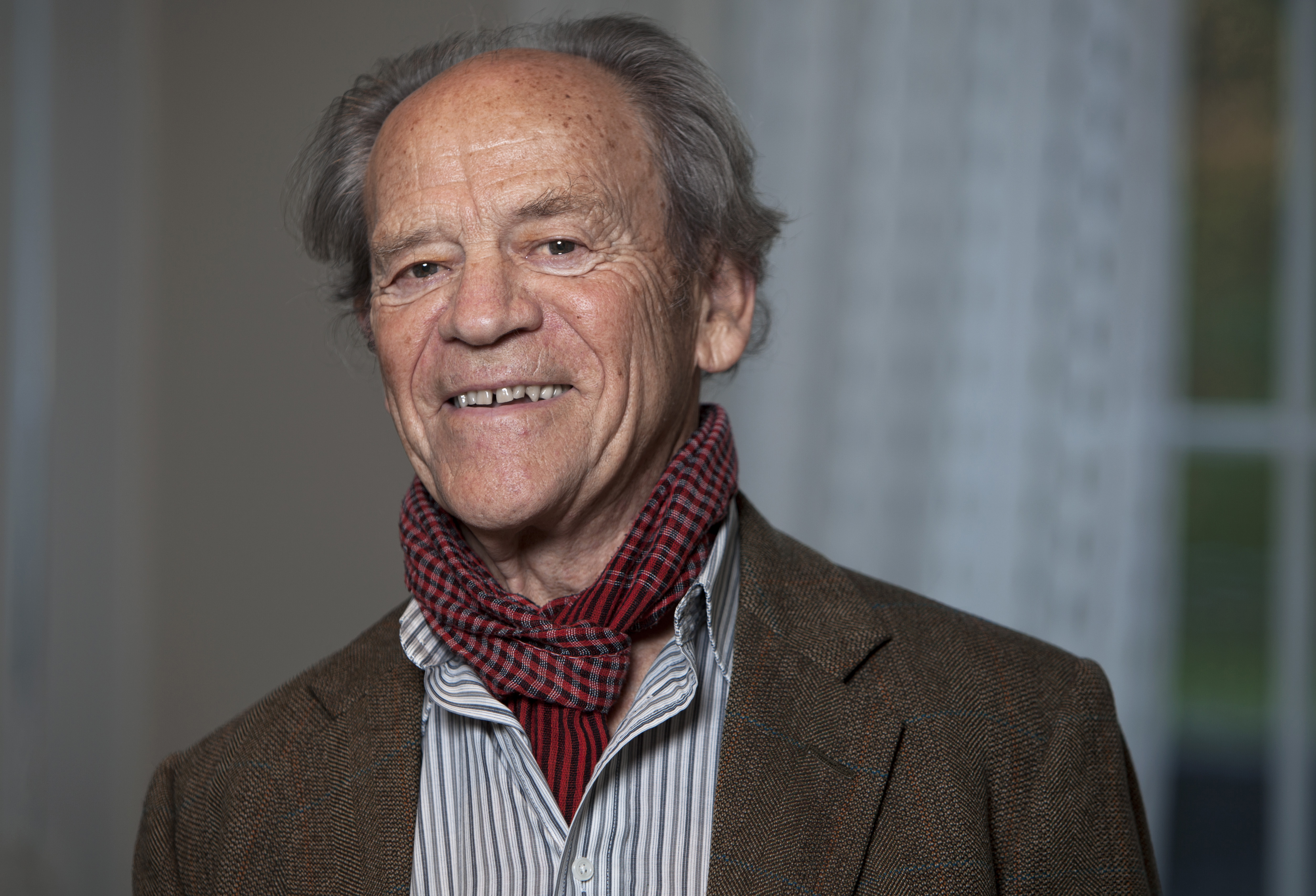 20111019 Stockholm, Sweden. "Universitet som kreativa miljöer?" Workshop arrangerad av Sveriges unga akademi om hur universiteten kan bidra till innovation och nytänkande. Foto: Markus Marcetic för Sveriges unga akademi